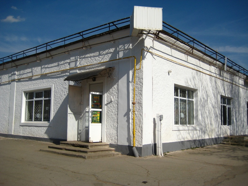 Здание бывшей синагоги жестянщиков